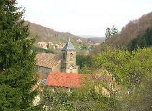 Auxelles-Haut vu du dessus du village, en direction de l'est. Photo prise par LP90 le 16 avril 2004. Licence GFDL LP90 avril 2004